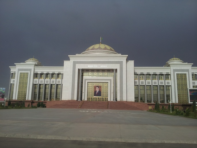 Дворец народных заседаний в Лебапском велаяте. Türkmençe: Lebap welaýatynyň Ruhyýet köşgi